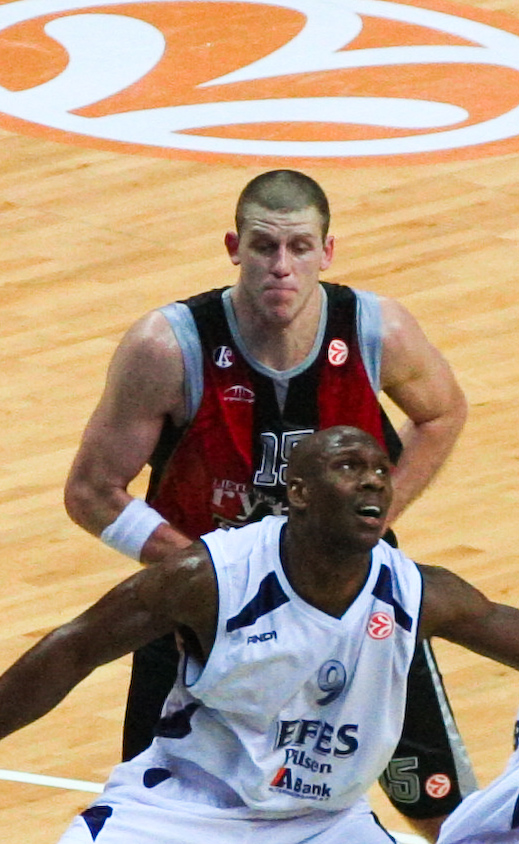 Marijonas Petravičius against Kenny Gregory during BC Lietuvos Rytas Vilnius home game against BC Efes Pilsen Istanbul in Siemens Arena, Lithuania